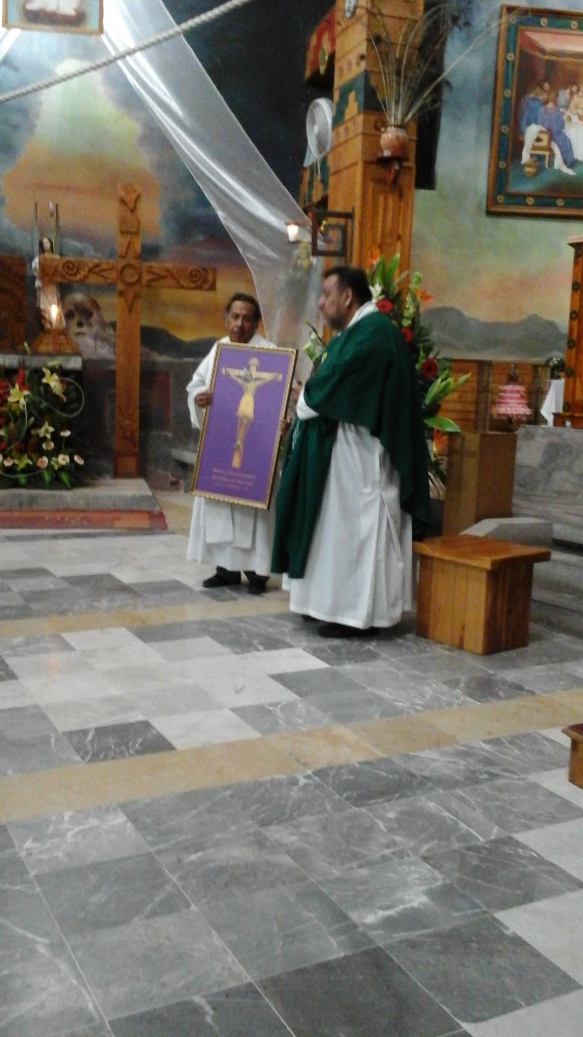 El P Arnulfo Mejia Rojas, recibe del parroco de Bustamante Nvo. Leon, una imagen del Señor de Tlaxcala, para que sea venerado por los catolicos en este lugar.